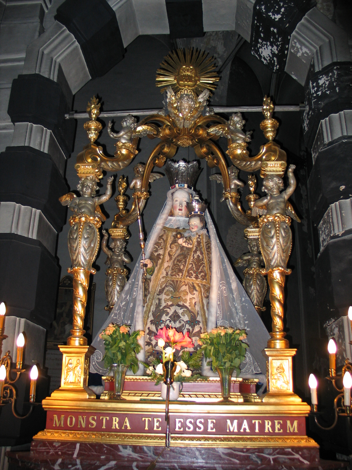 O.L.V. van Hanswijk - eigen foto